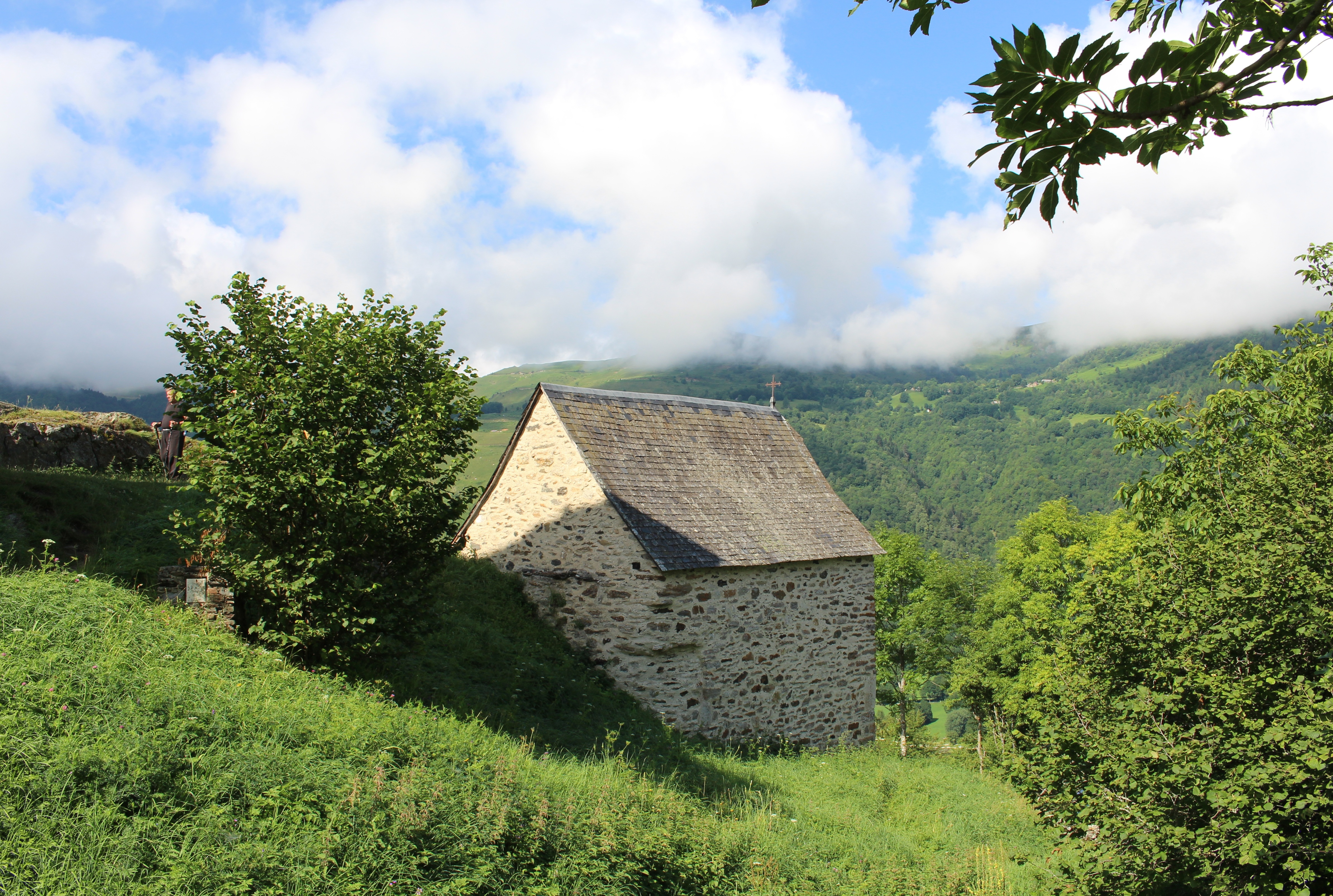 Chapelle Sainte-Madeleine de Loudervielle (Hautes-Pyrénées)